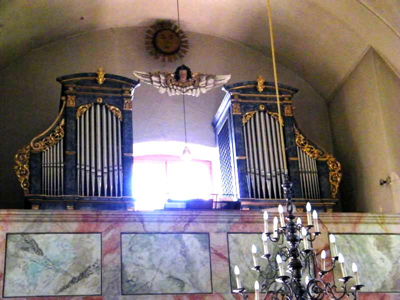 Maria Bühel Mooser Orgel